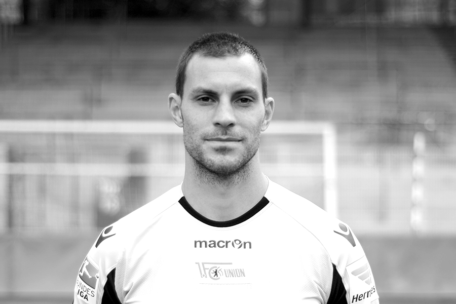 Mannschaftsfoto 2015/16